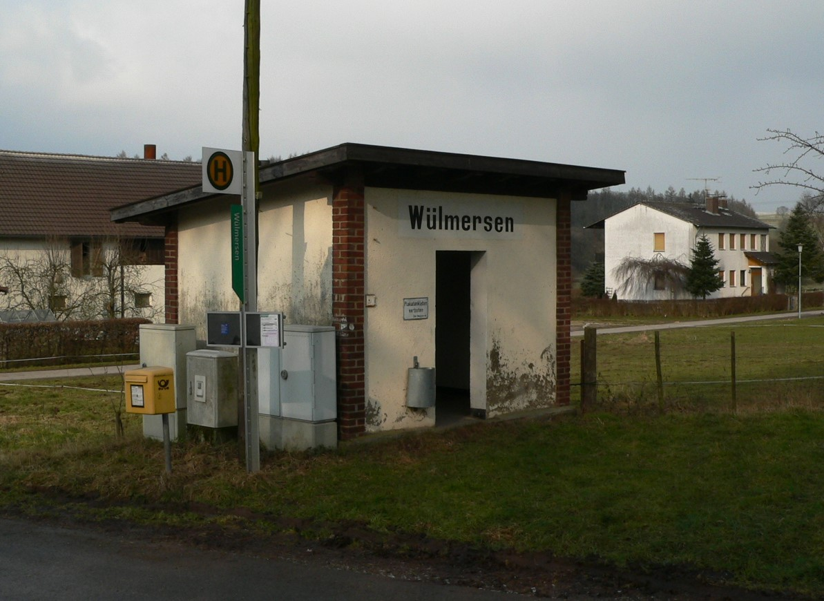 Ehemaliger Haltepunkt der Carlsbahn in Wülmersen Fotograf: selbst fotografiert Datum: 12.02.2006